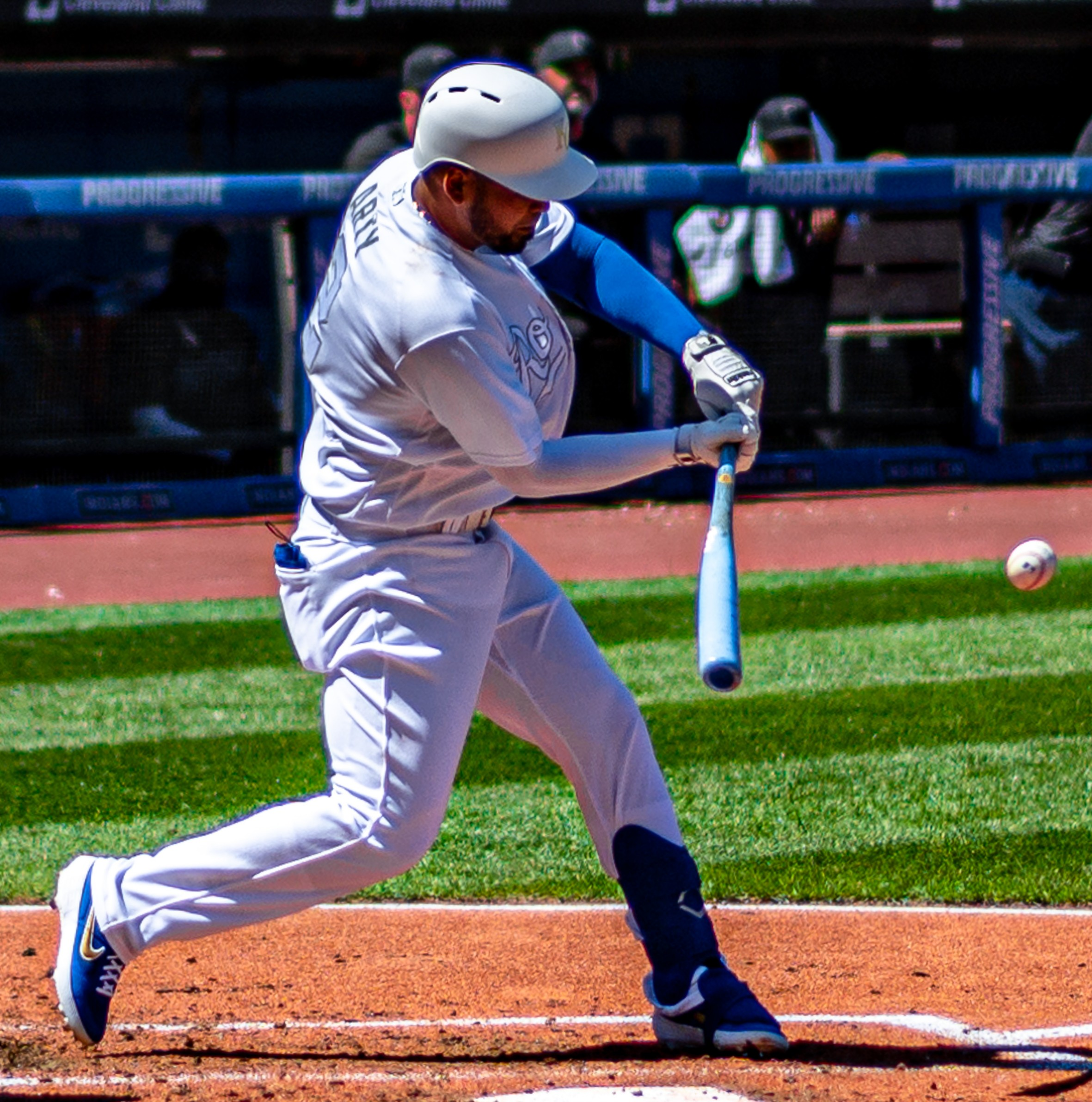 Kansas City Royals VS. Cleveland Indians